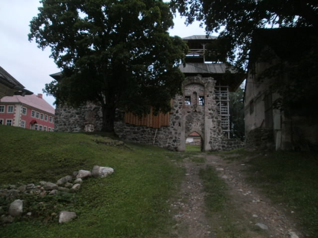 Vaade väravatornile eeslinnuse värava asukohast.